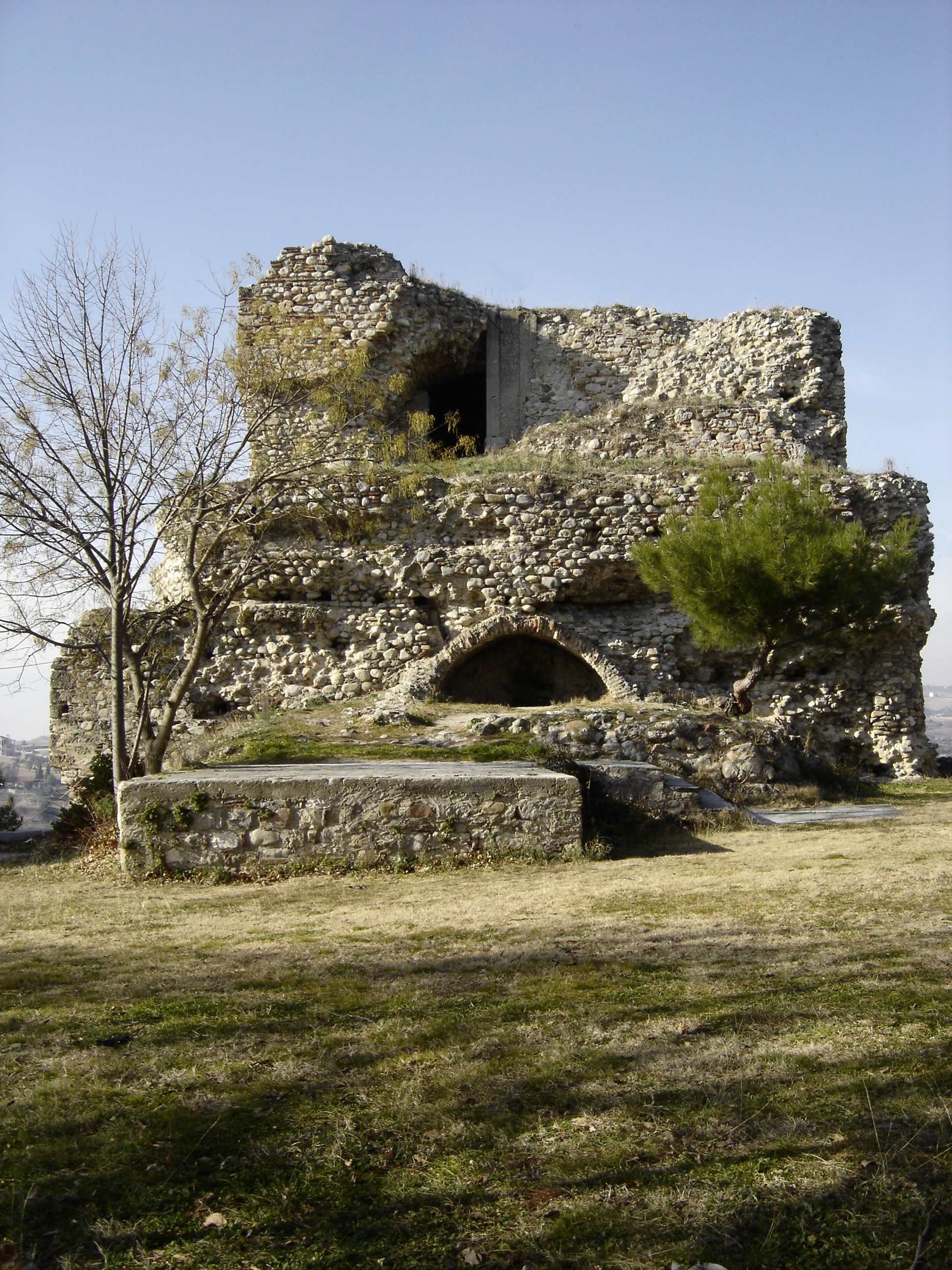 Ο Πύργος του Ορέστη ή Πύργος του Βασιλέως στην Ακρόπολη των Σερρών.